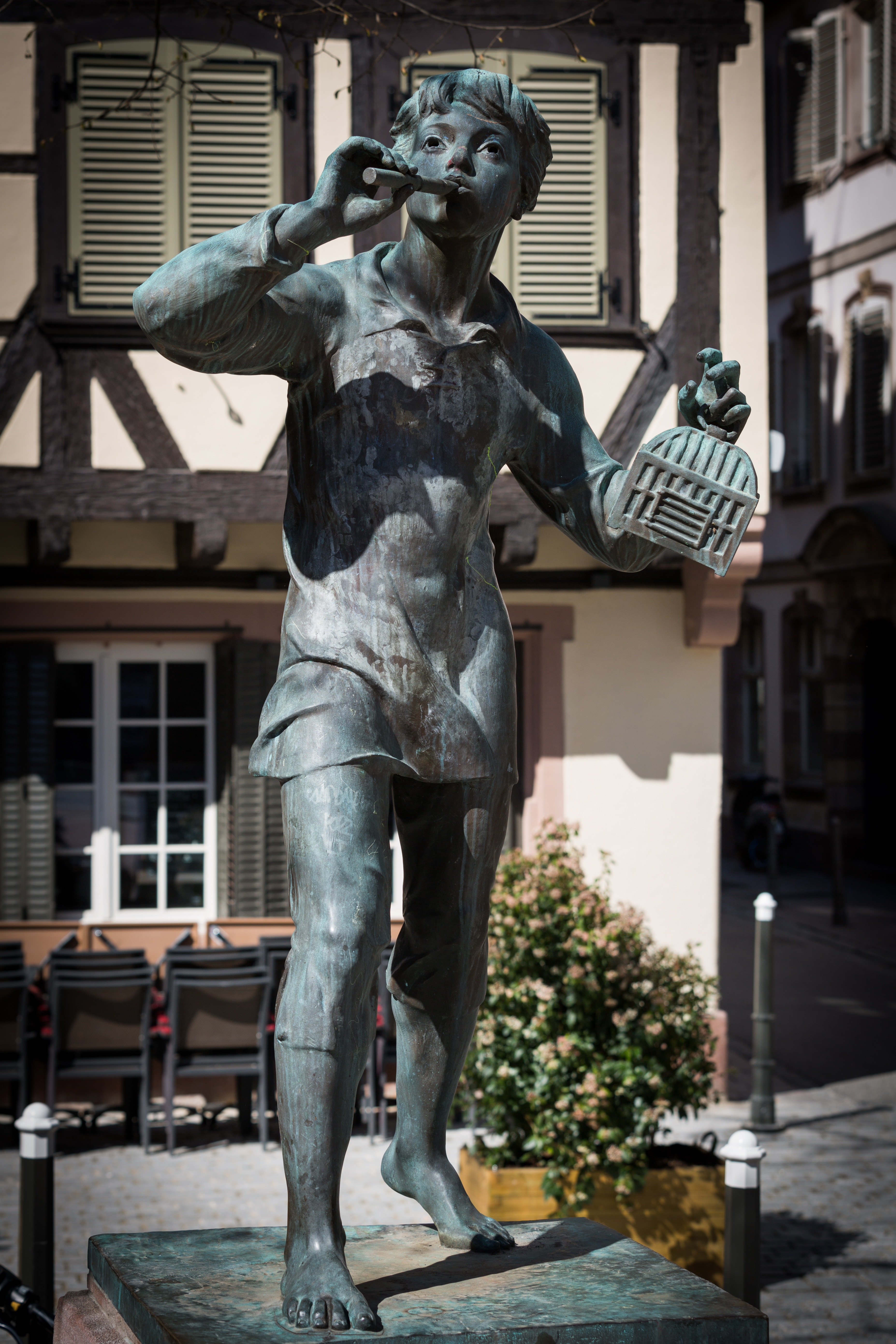 Strasbourg place Saint-Etienne : le Meiselocker